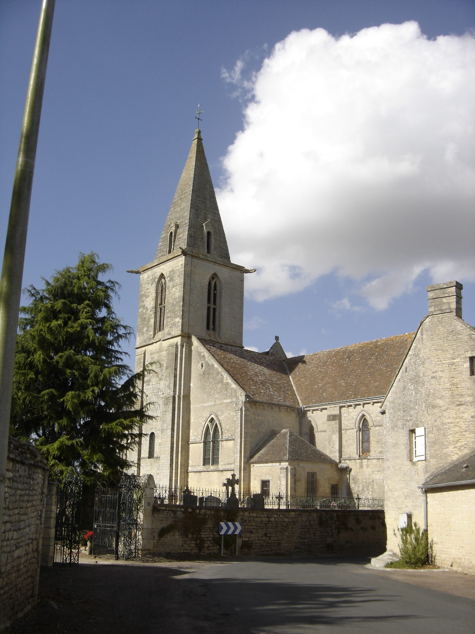 l'église Notre-Dame vue de la rue de l'église